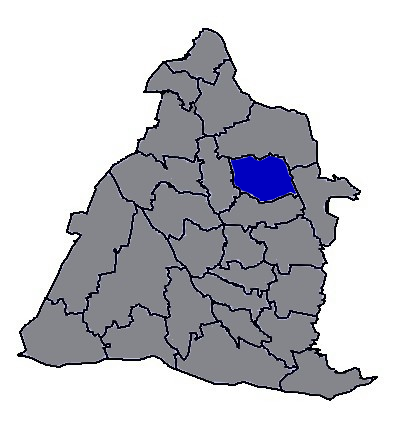 臺灣省彰化縣花壇鄉。